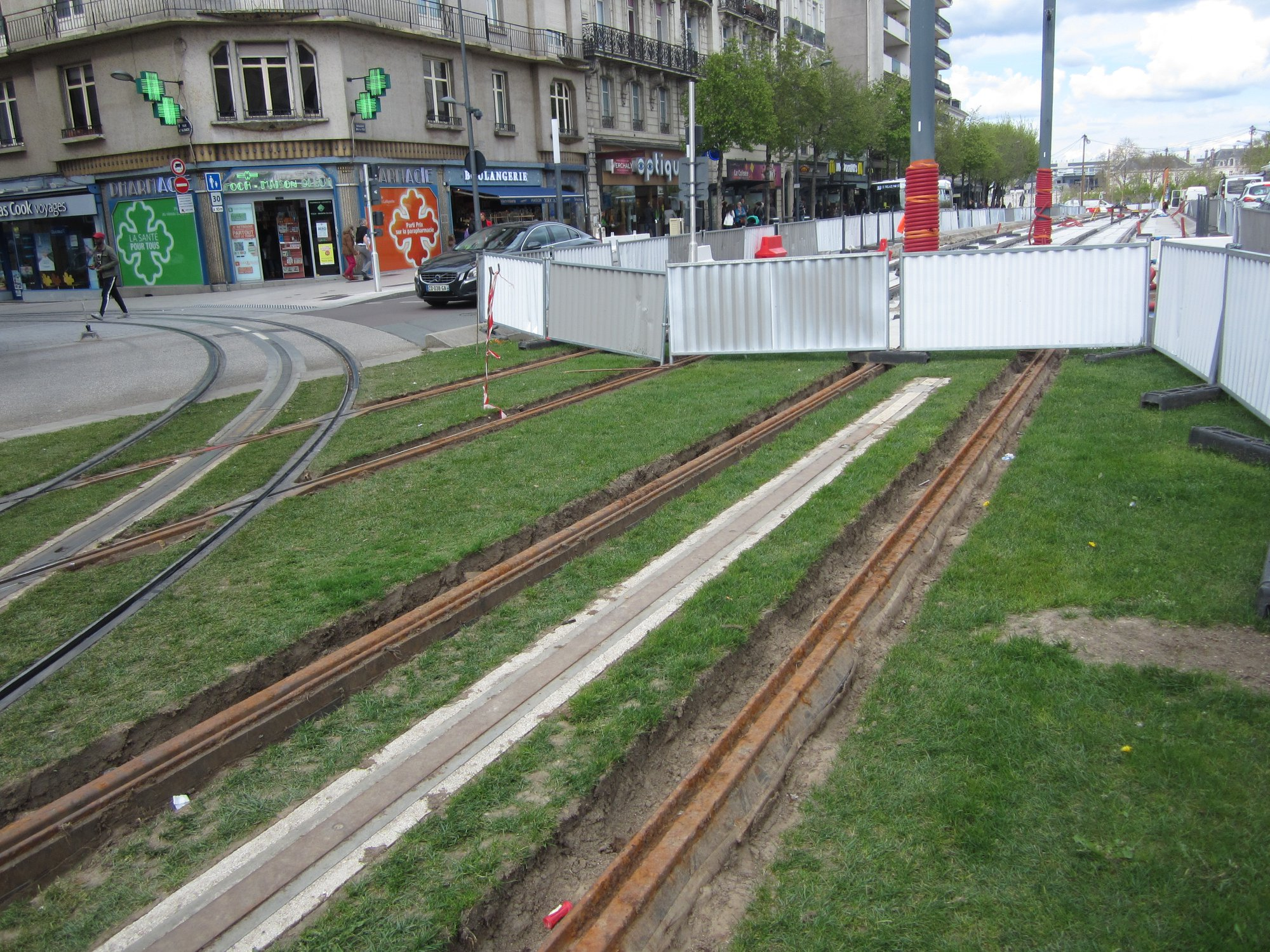 boulevard Foch future ligne A et C Angers